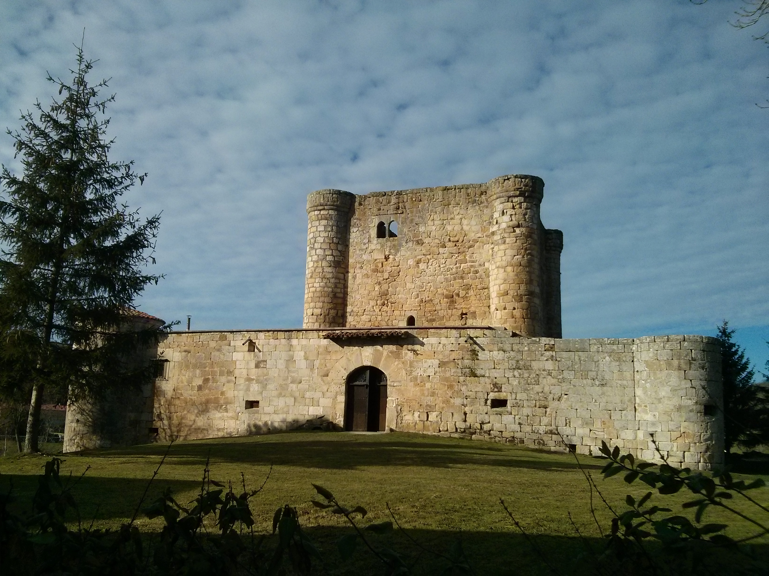 Enero 2015